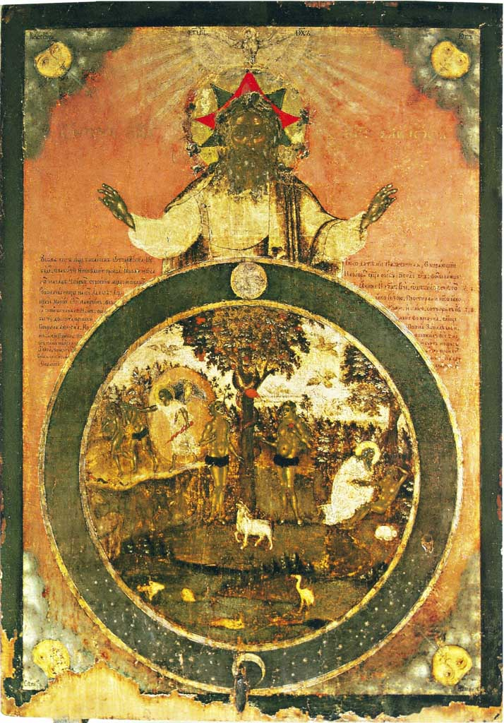 СОТВОРЕНИЕ МИРА Первая четверть XVIII века. Дерево (липа), темпера.74,5х52,5см.